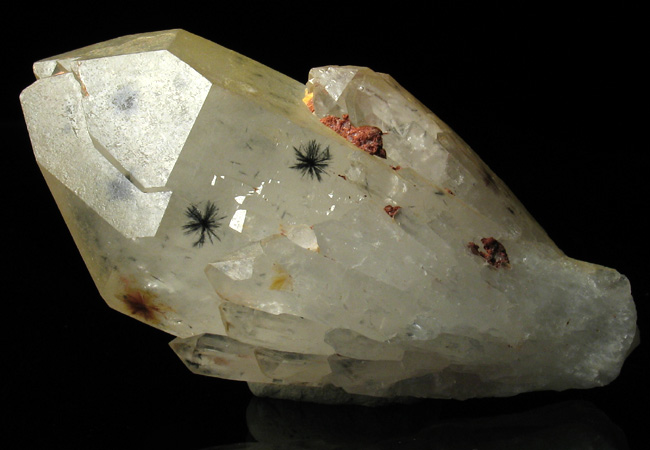 kwarc i hollandyt, pochodzenie Madagaskar; autor zdjęcia Stowarzyszenie Spirifer